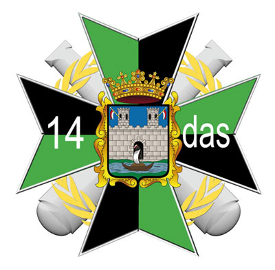 Odznaka pamiątkowa 14 Dywizjon Artylerii Samobieżnej im. gen. bryg. Wacława Wieczorkiewicza